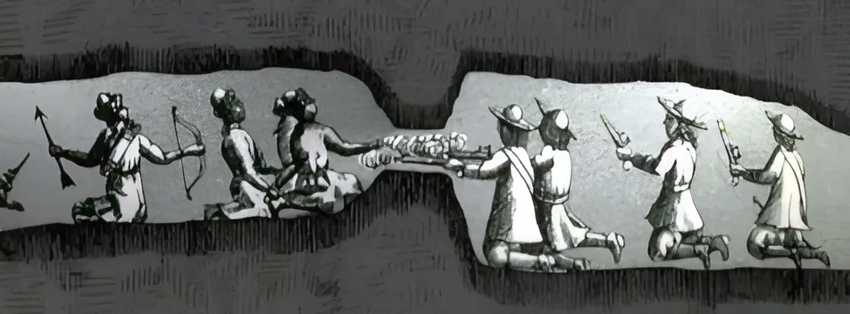 Kampf unter der Erde